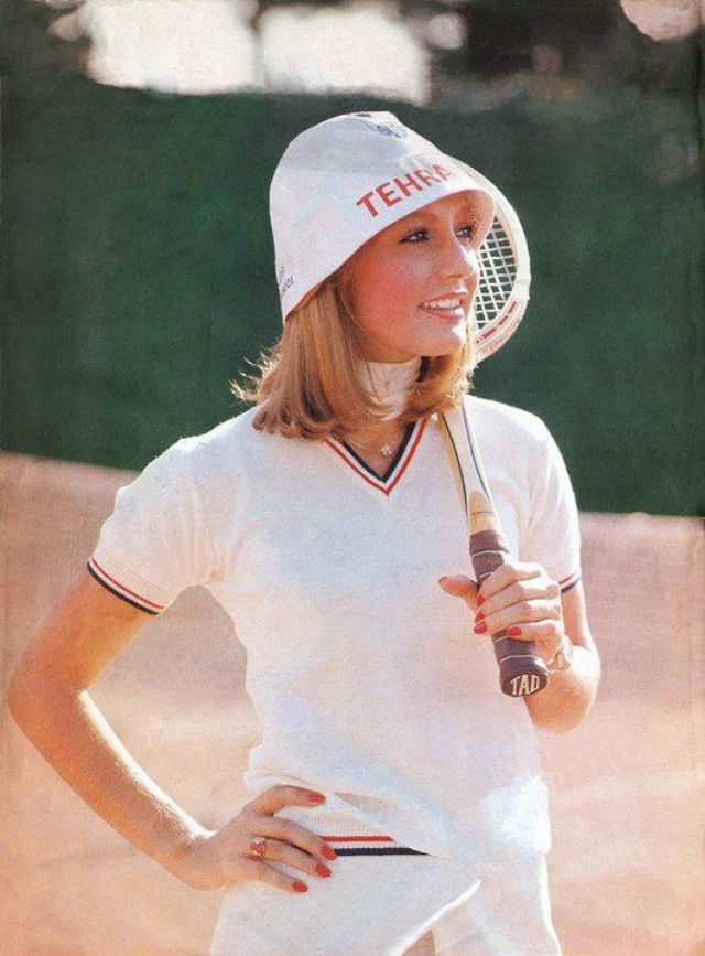 گوگوش در حال بازی تنیس